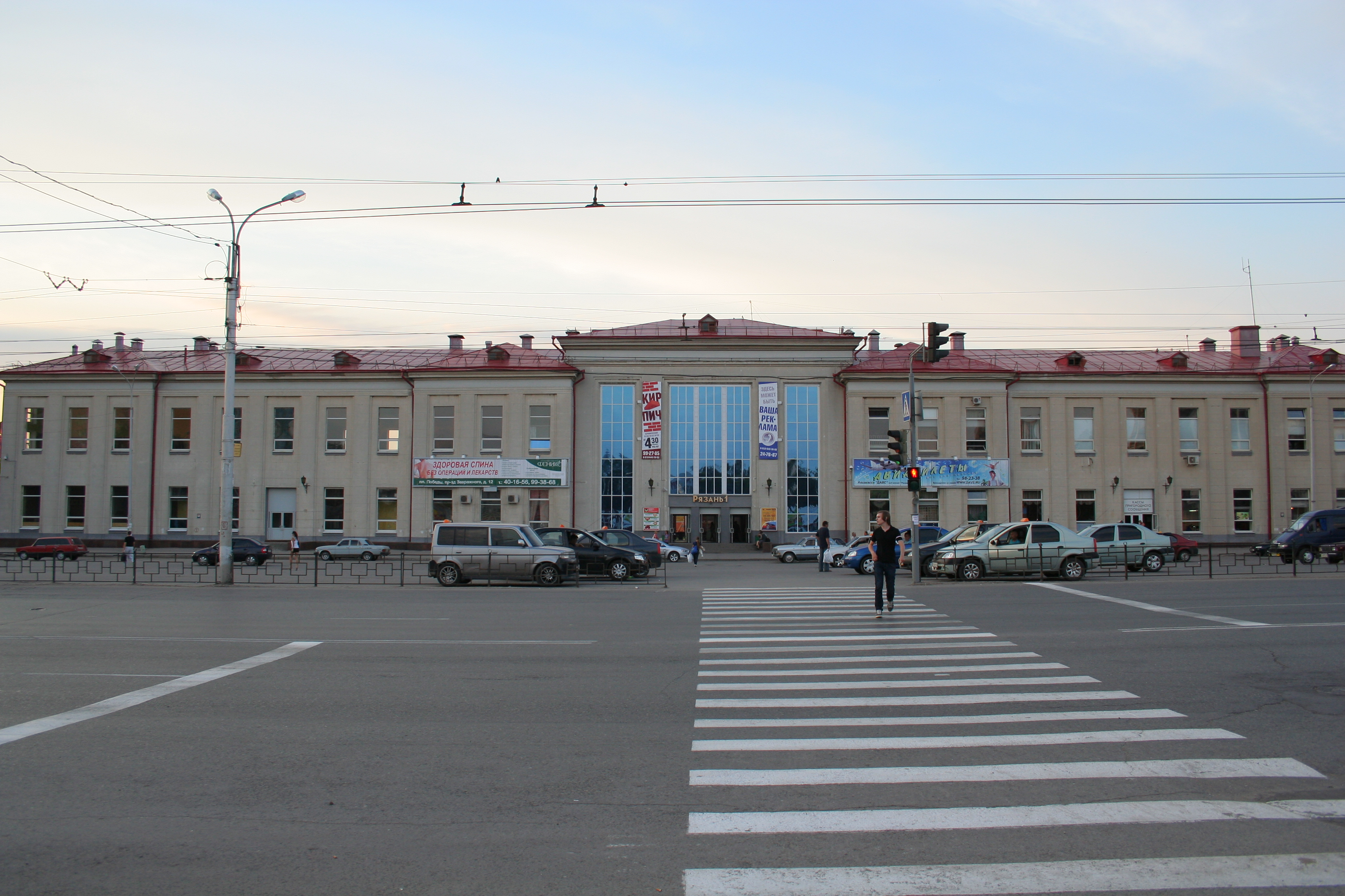 Stadt Rjasan (Russland). Bahnhof Rjasan-1.